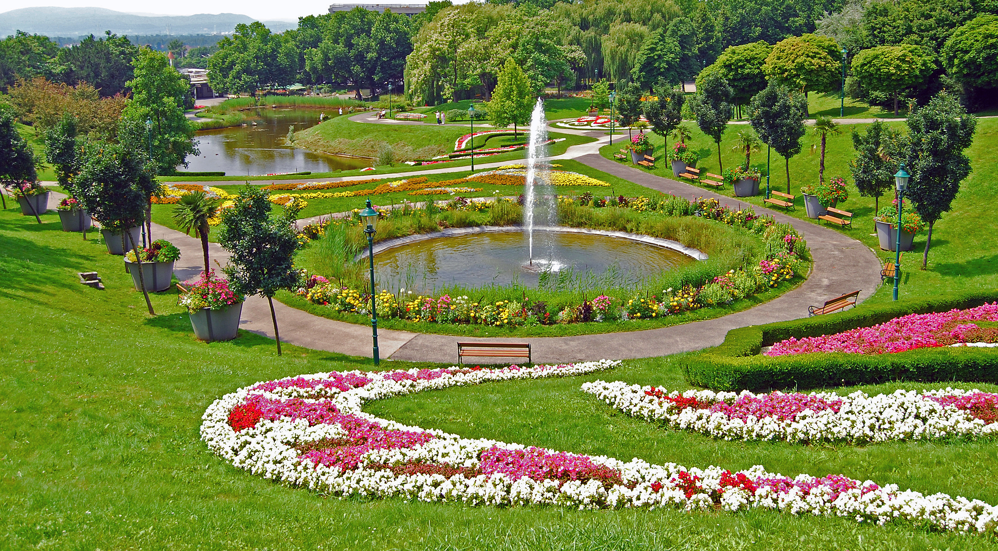 Kurpark Oberlaa Gartenbaudenkmale, Wegsysteme und künstliche Bodenformationen